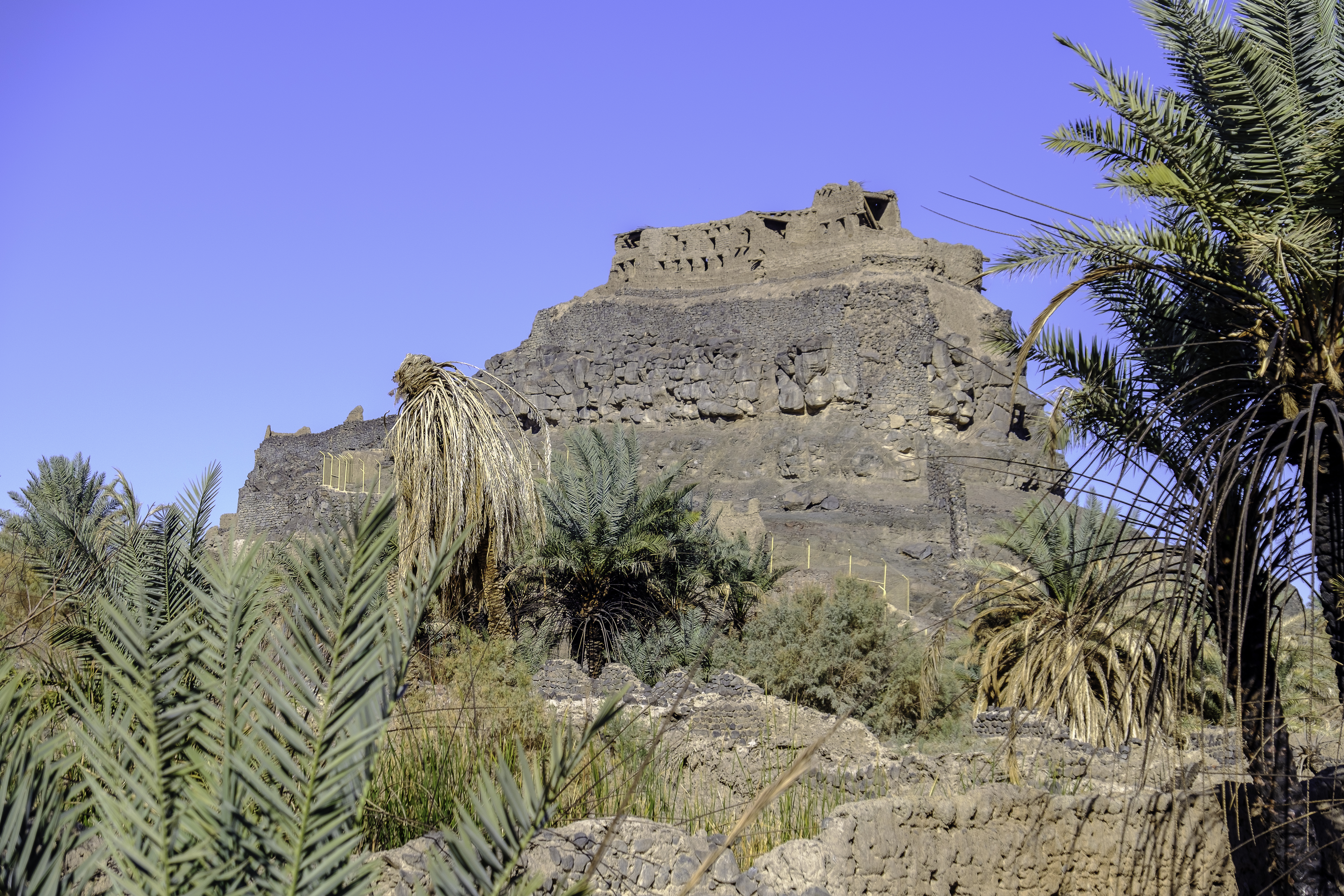 Het fort Qamus gezien vanaf de oase bij Khaybar